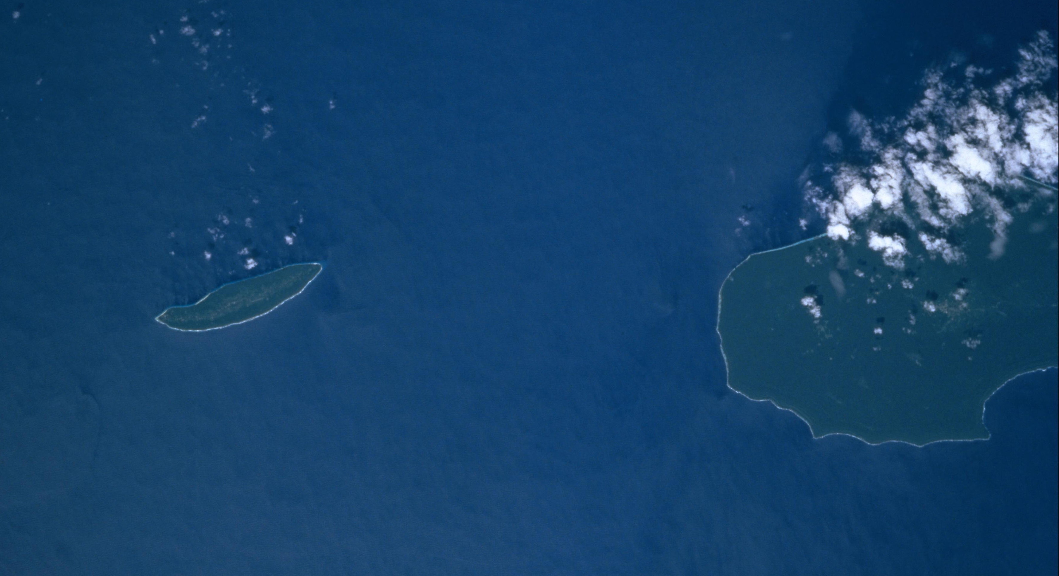 Foto desde el espacio de la isla de Bellona